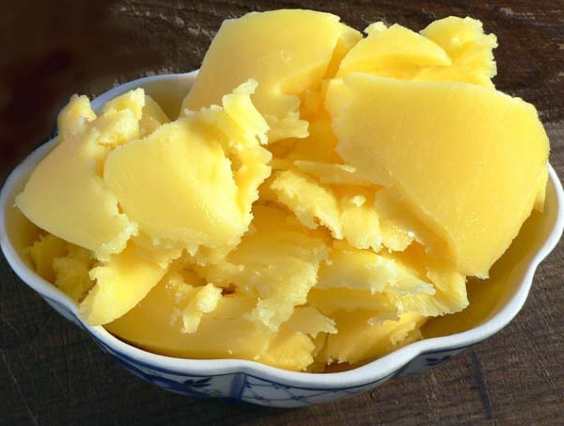 Заморженое и разрезаное топленое масло